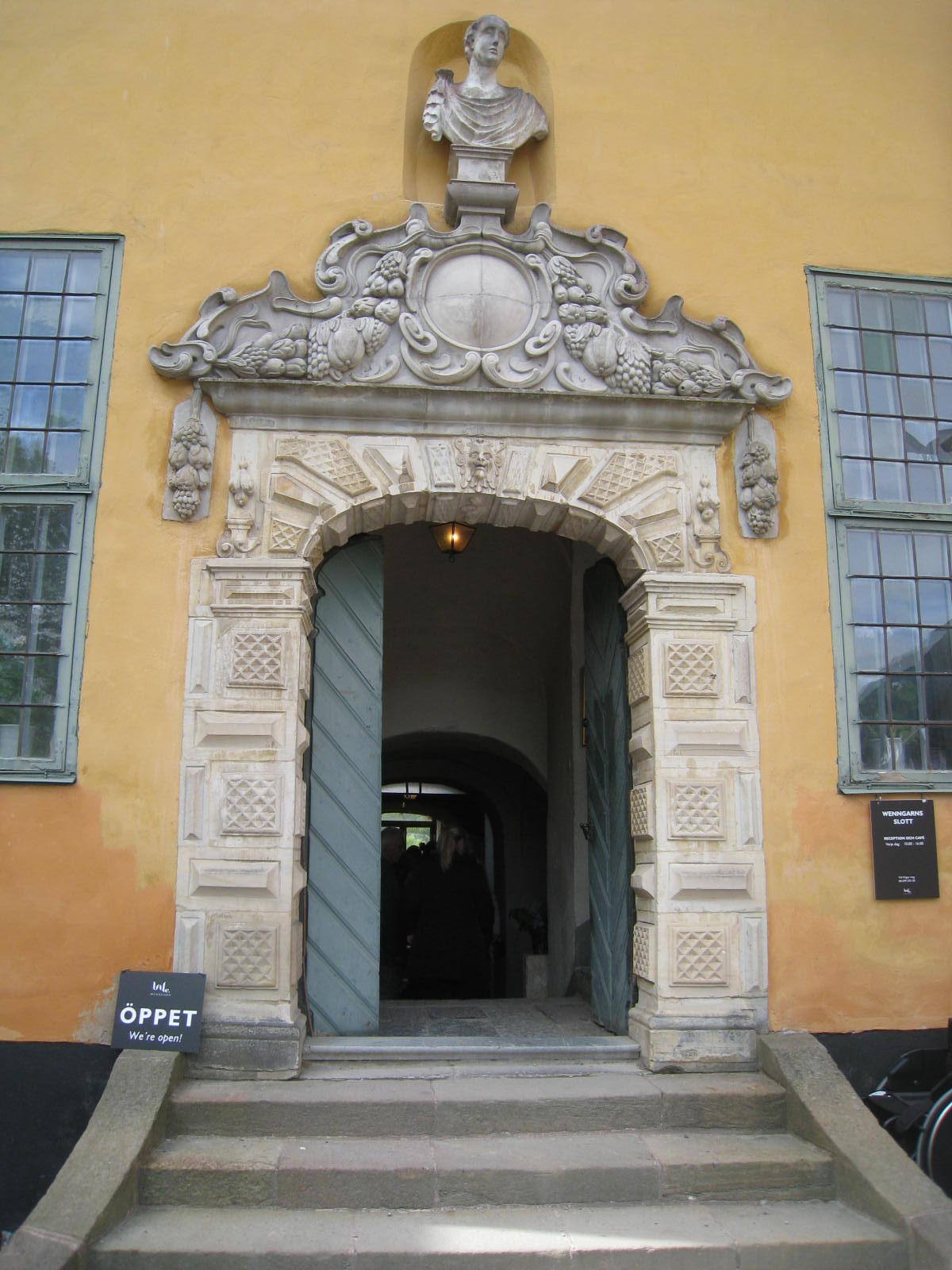 Wenngarns slott, portalen på nordfasaden. Stenhuggaren Markus Hebel (död 1664) utförde bland annat dekorativa ytterportaler på Venngarns slott, Sigtuna, Uppland.